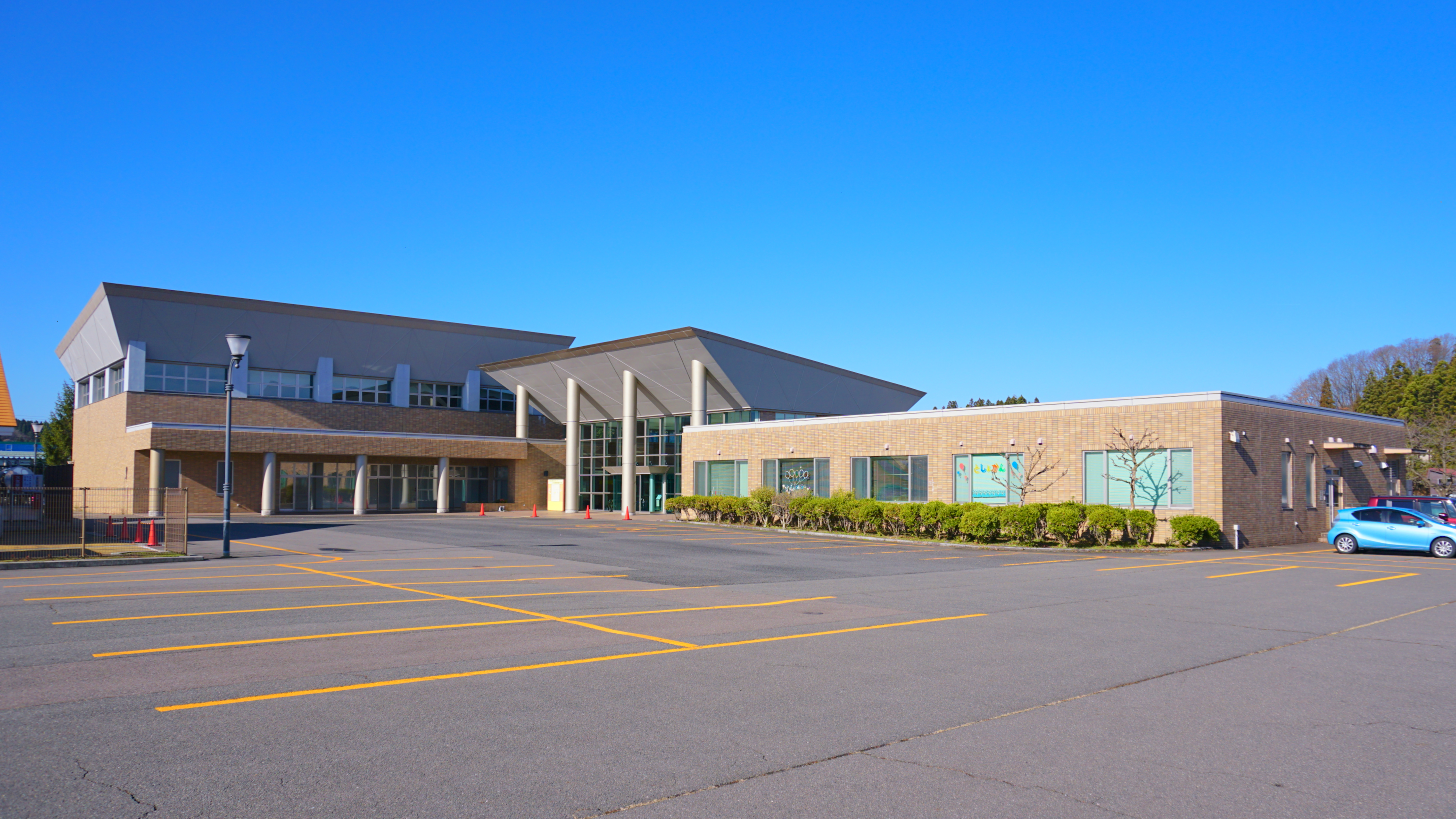 秋田市河辺総合福祉交流センター。秋田市立中央図書館明徳館の河辺分館が入る。 Sony ILCE-6300